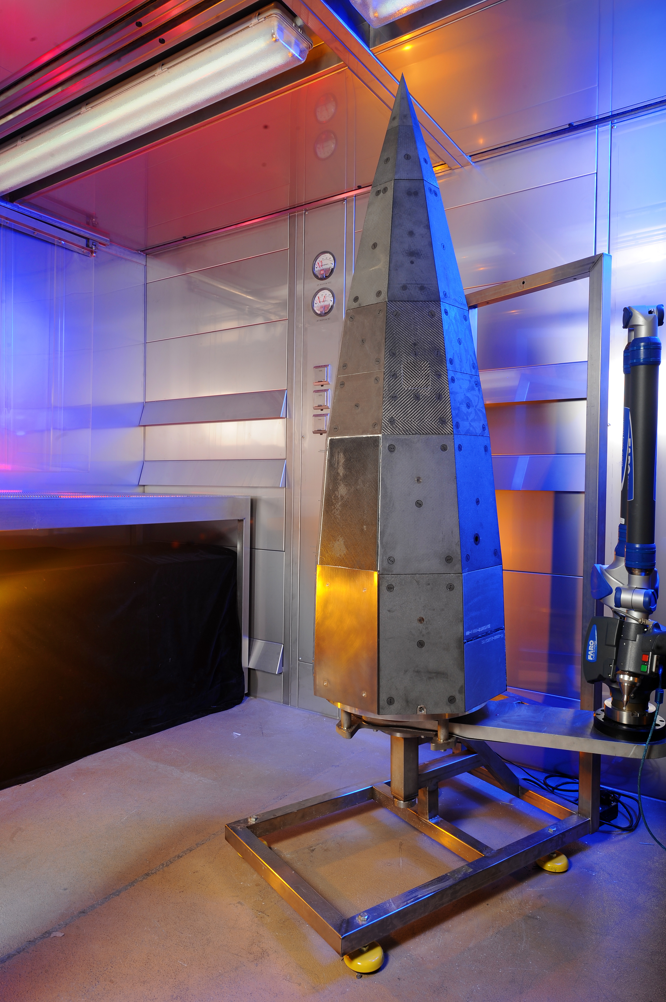 Die fertig zusammengebaute SHEFEX II-Spitze.